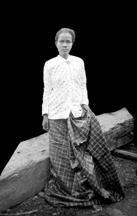 Negatief. De echtgenote van Aroe Lompeenge te Tjabeenge, aan de rivier Walanaé, Zuiod-Sulawesi.